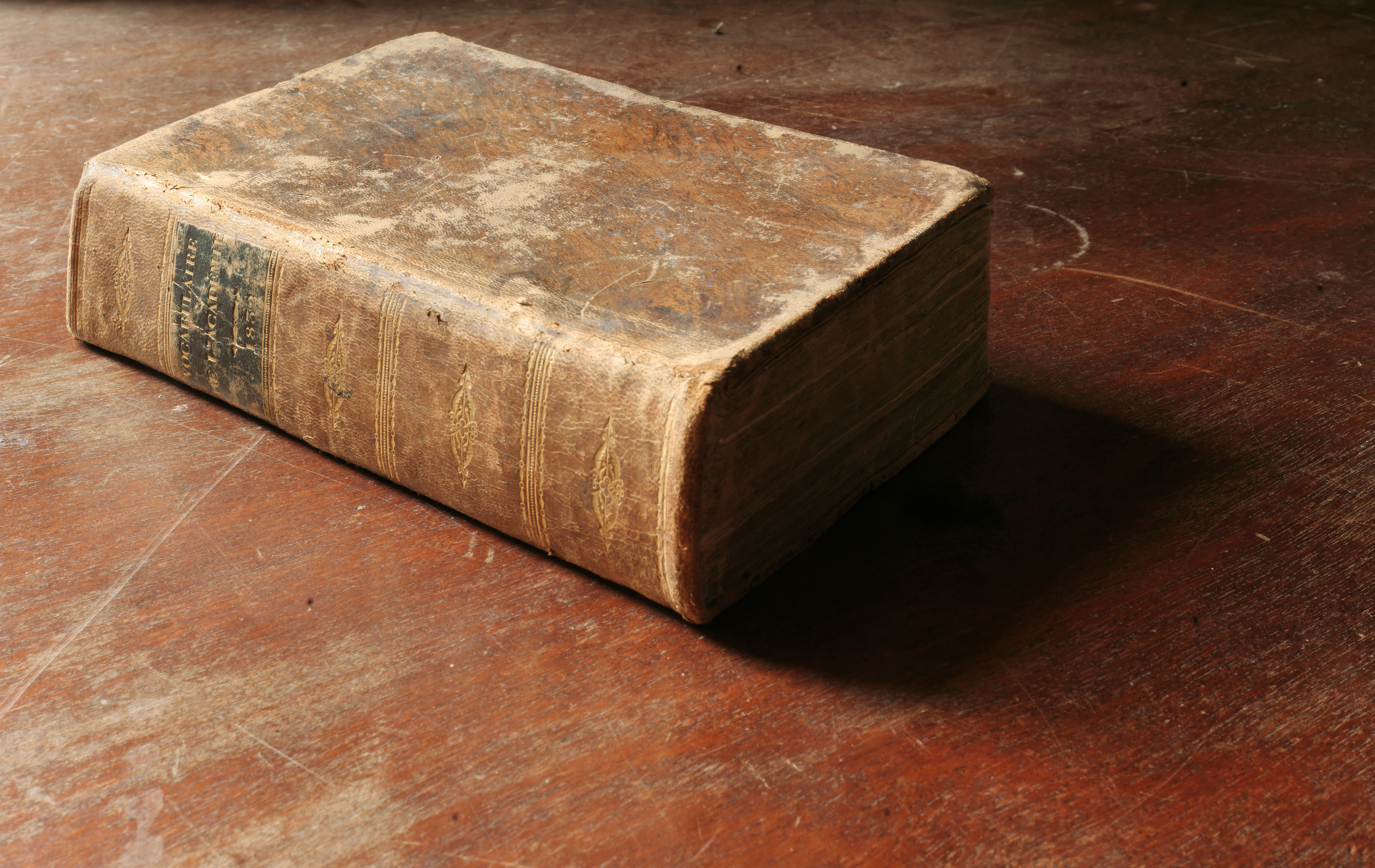 Vocabulaire de l'académie, 1832